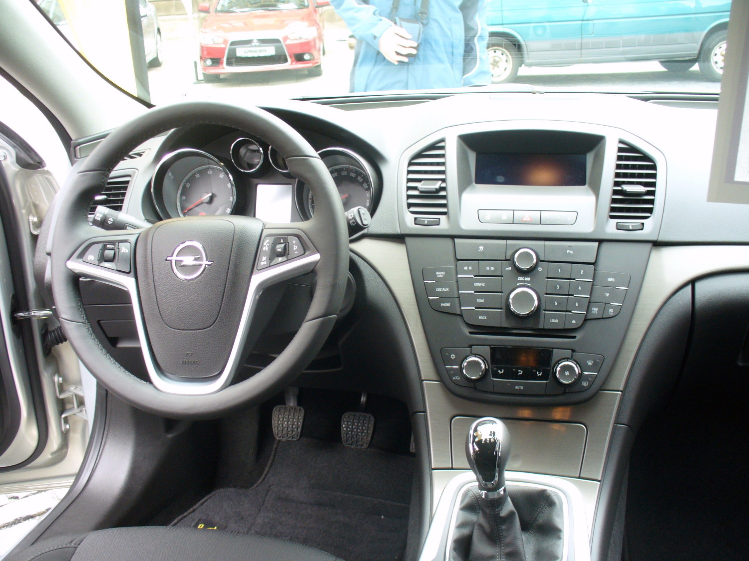 Opel Insignia Sportstourer